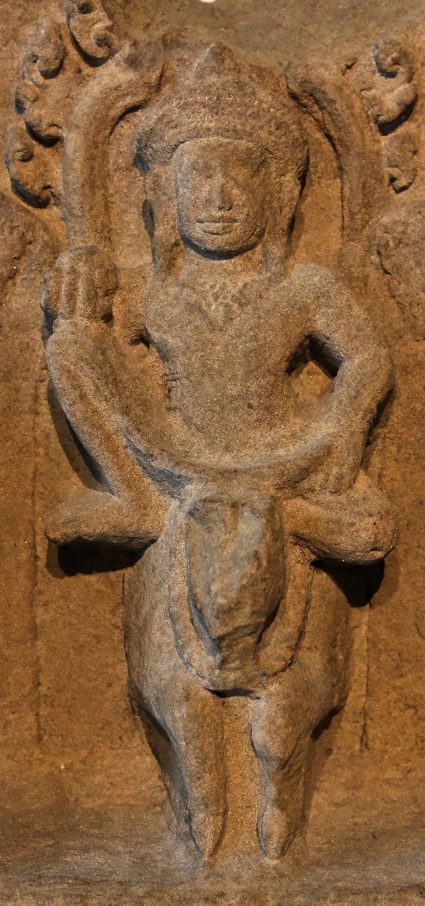 Les neufs Devas - Provenance exacte inconnue - Style des Khleang - Dernier quart du Xe siècle, début XIe siècle - Grès - Musée Guimet, Paris - Yama (juge des morts, gardien du sud) sur le buffle.